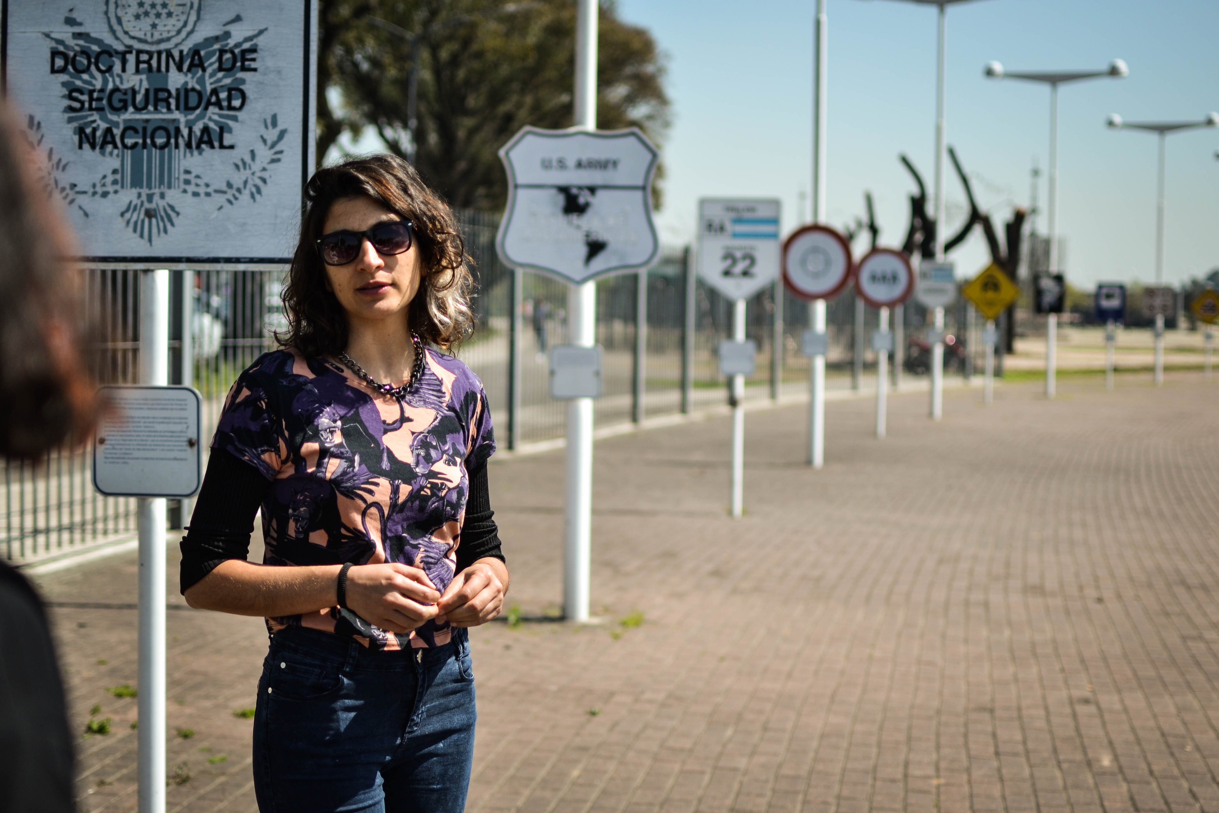 Grupo de Arte Callejero en la visita guiada por el Parque de la memoria